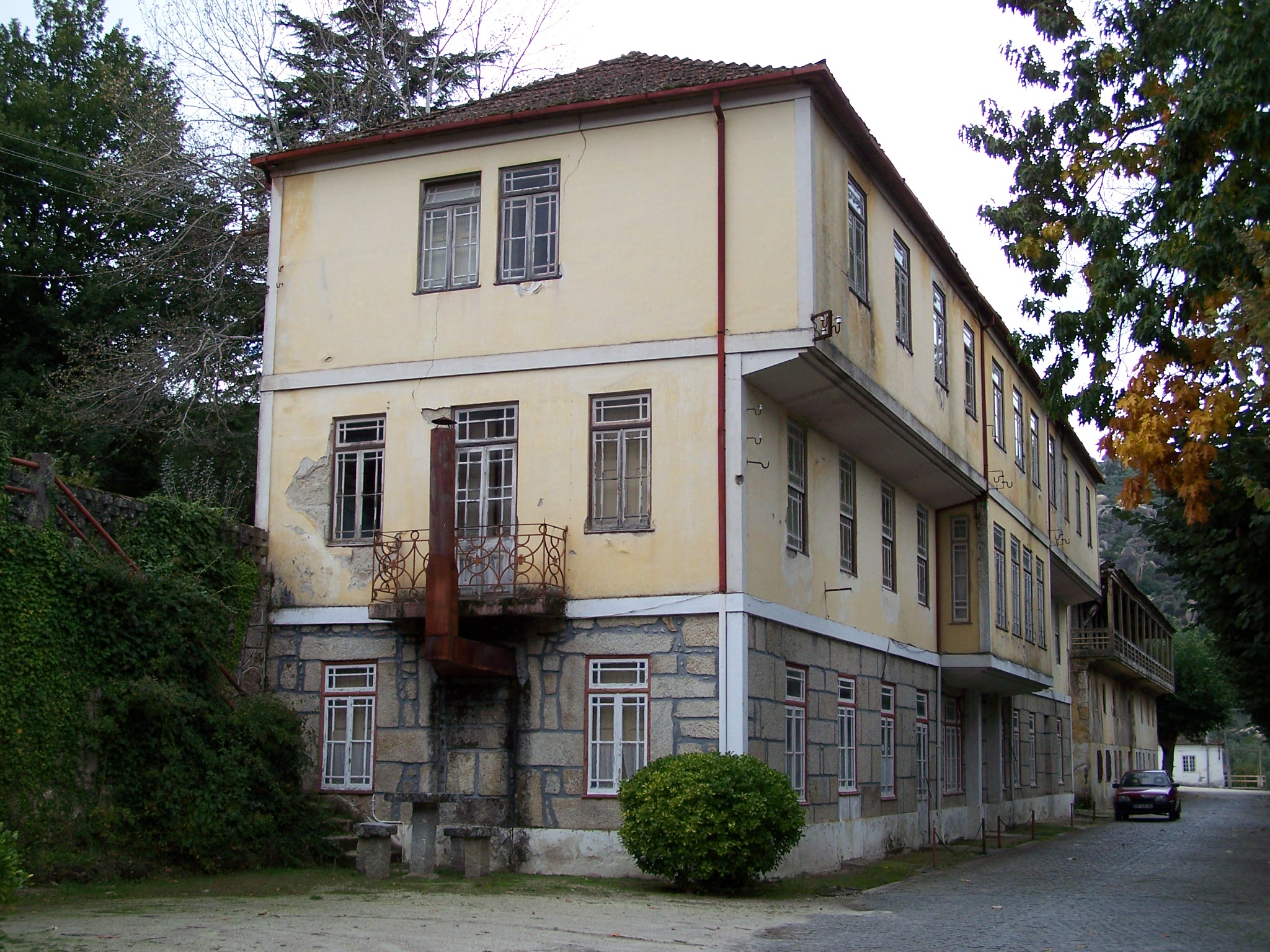 Caldas da Cavaca, estância termal perto de Aguiar da Beira, Portugal.